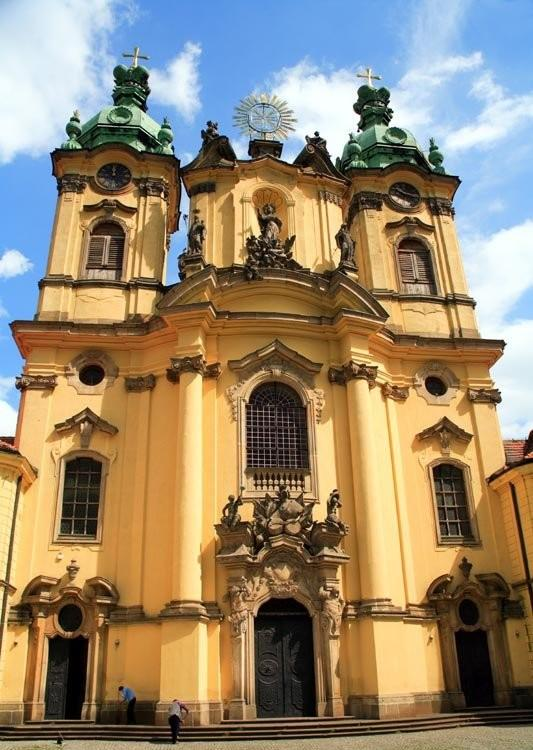 Legnickie Pole